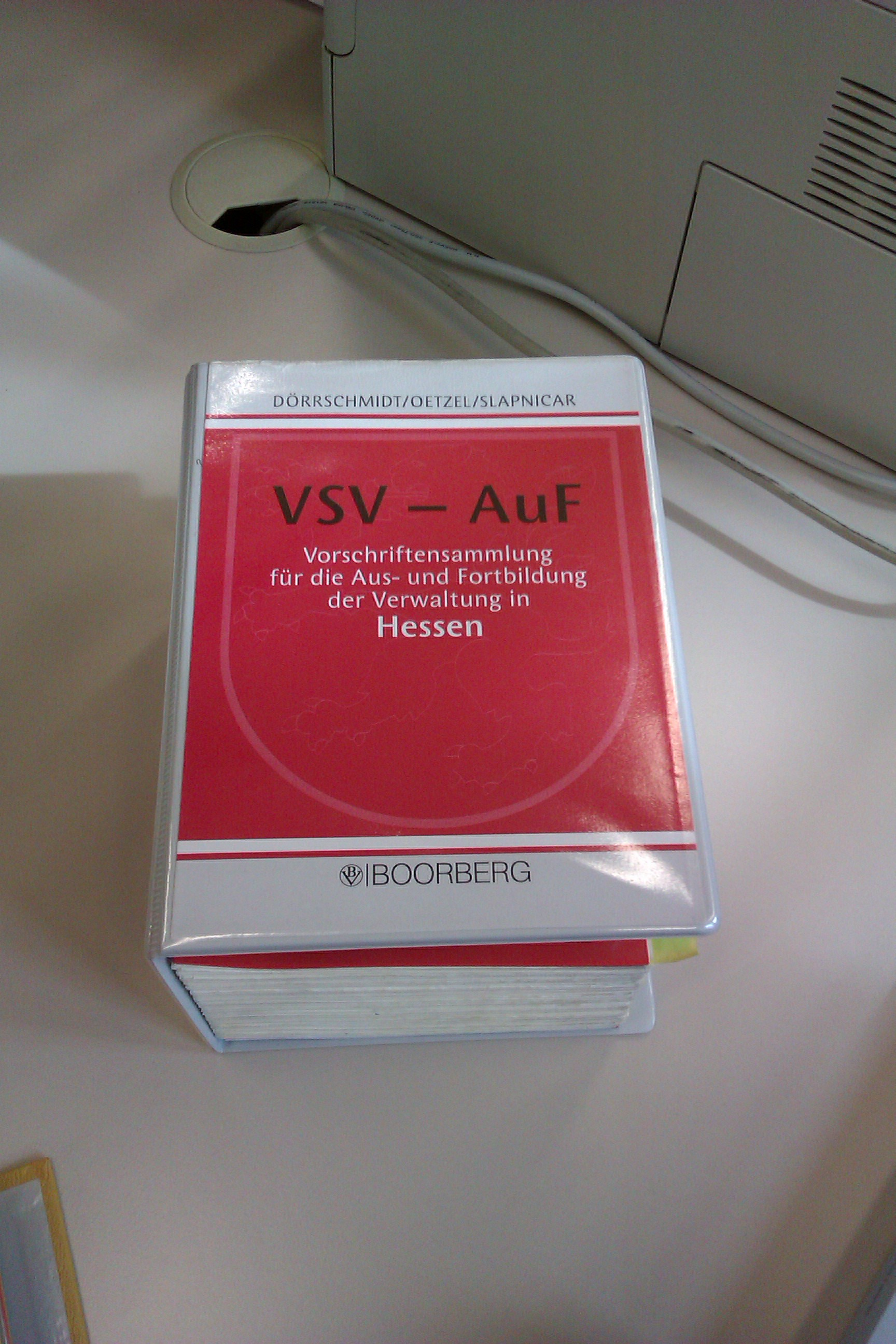 Vorschriftensammlung für die Aus- und Fortbildung der Verwaltung in Hessen